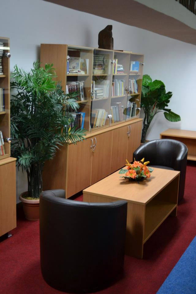 Билбиотека